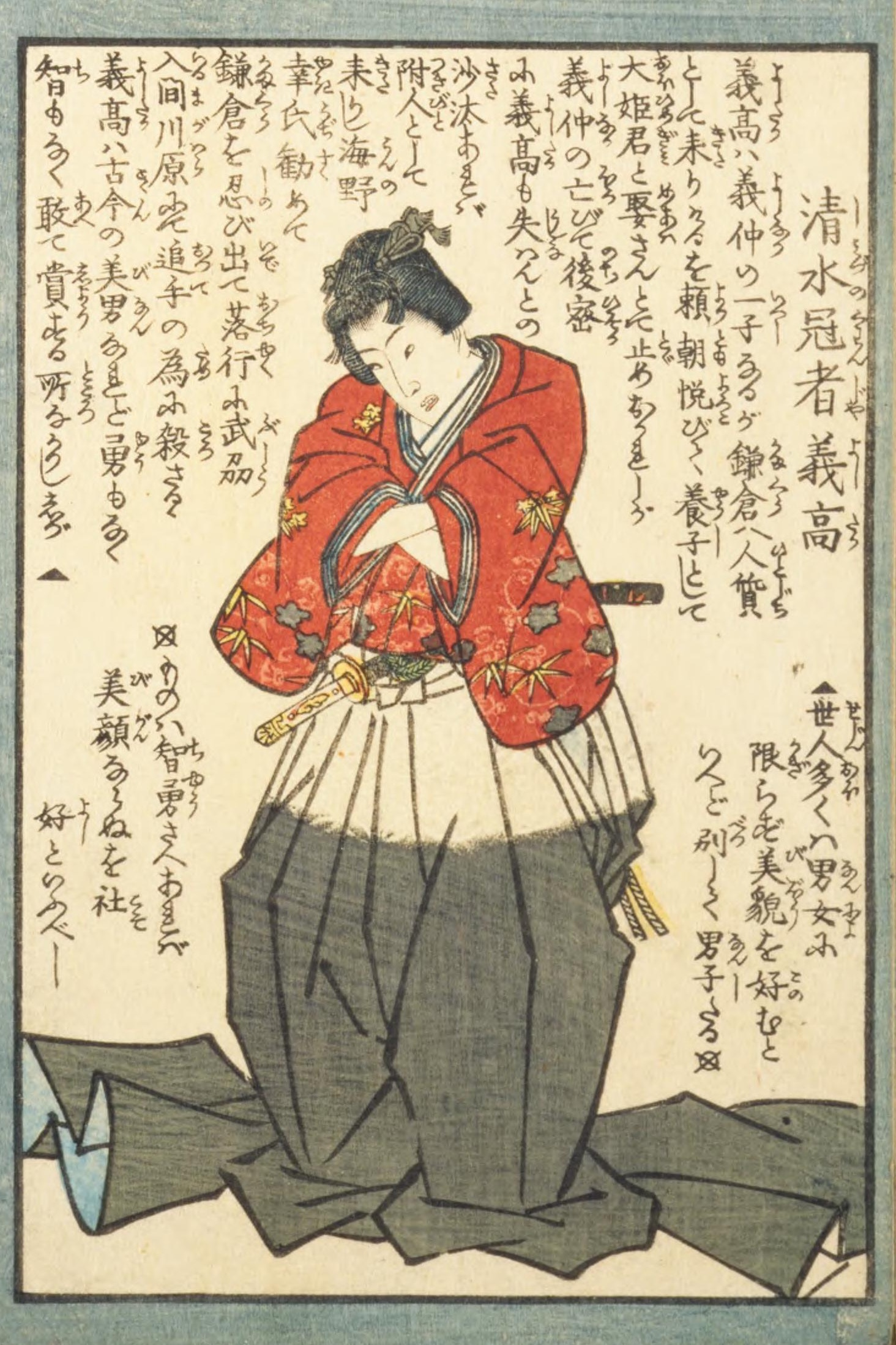 武者鑑一名人相合南伝二 清水冠者義高